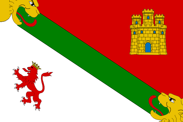 Bandera Municipal de Villamanrique de Tajo (Madrid)